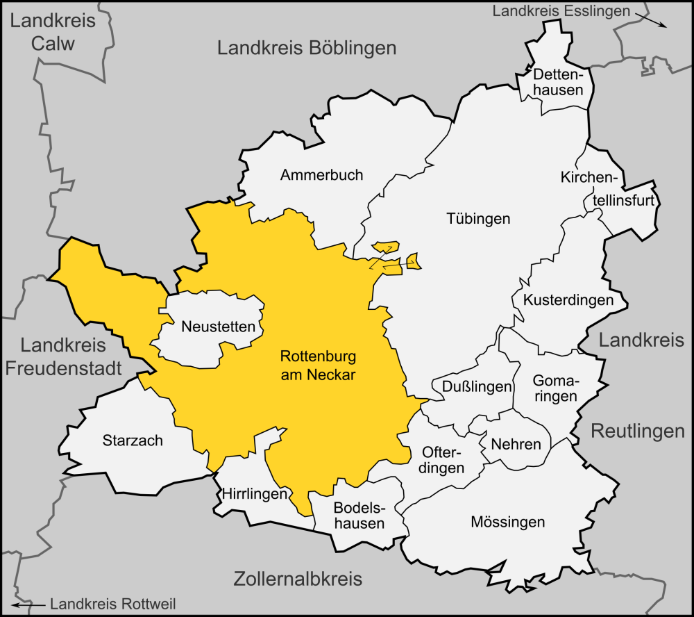 Karte der Stadt Rottenburg am Neckar im Landkreis Tübingen